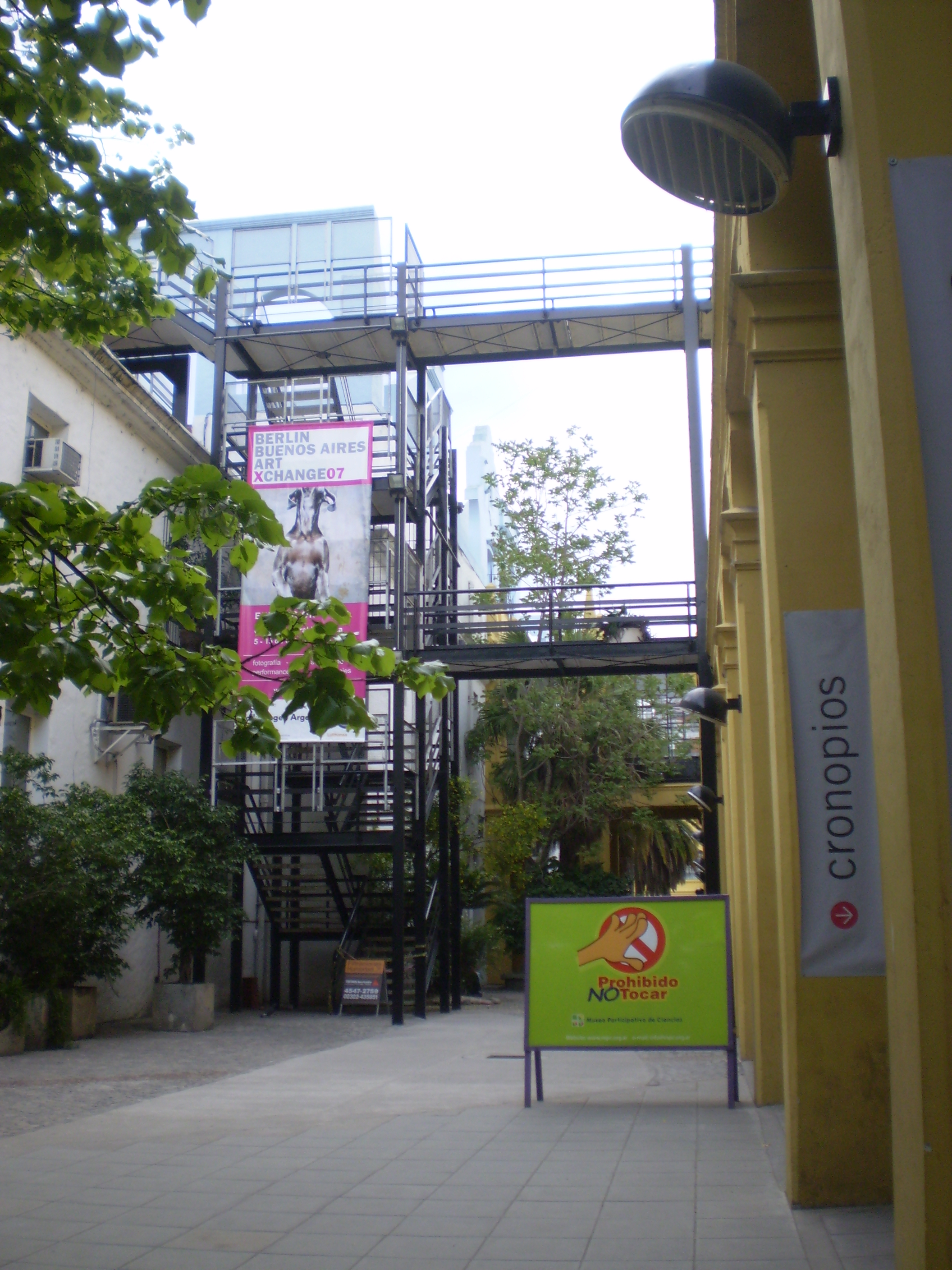 Centro Cultural Recoleta (Buenos Aires, Argentina)